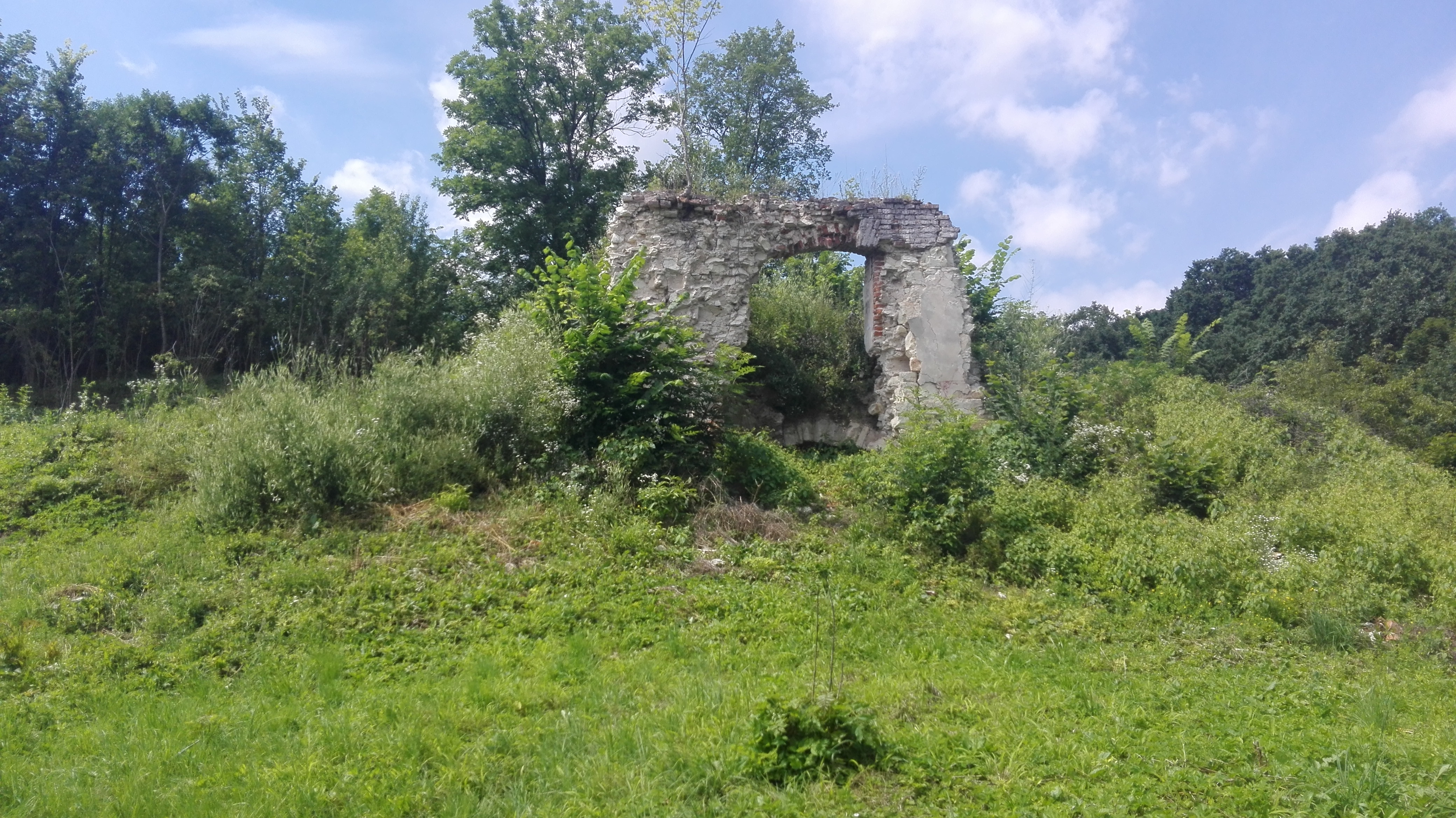 Ruiny wieży zamkowej z 2 połowy XIV wieku, przebudowanej w XVI wieku.